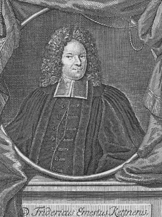 Kupferstich aus einer Lebensbeschreibung von Friedrich Ernst Kettner (1671-1722)